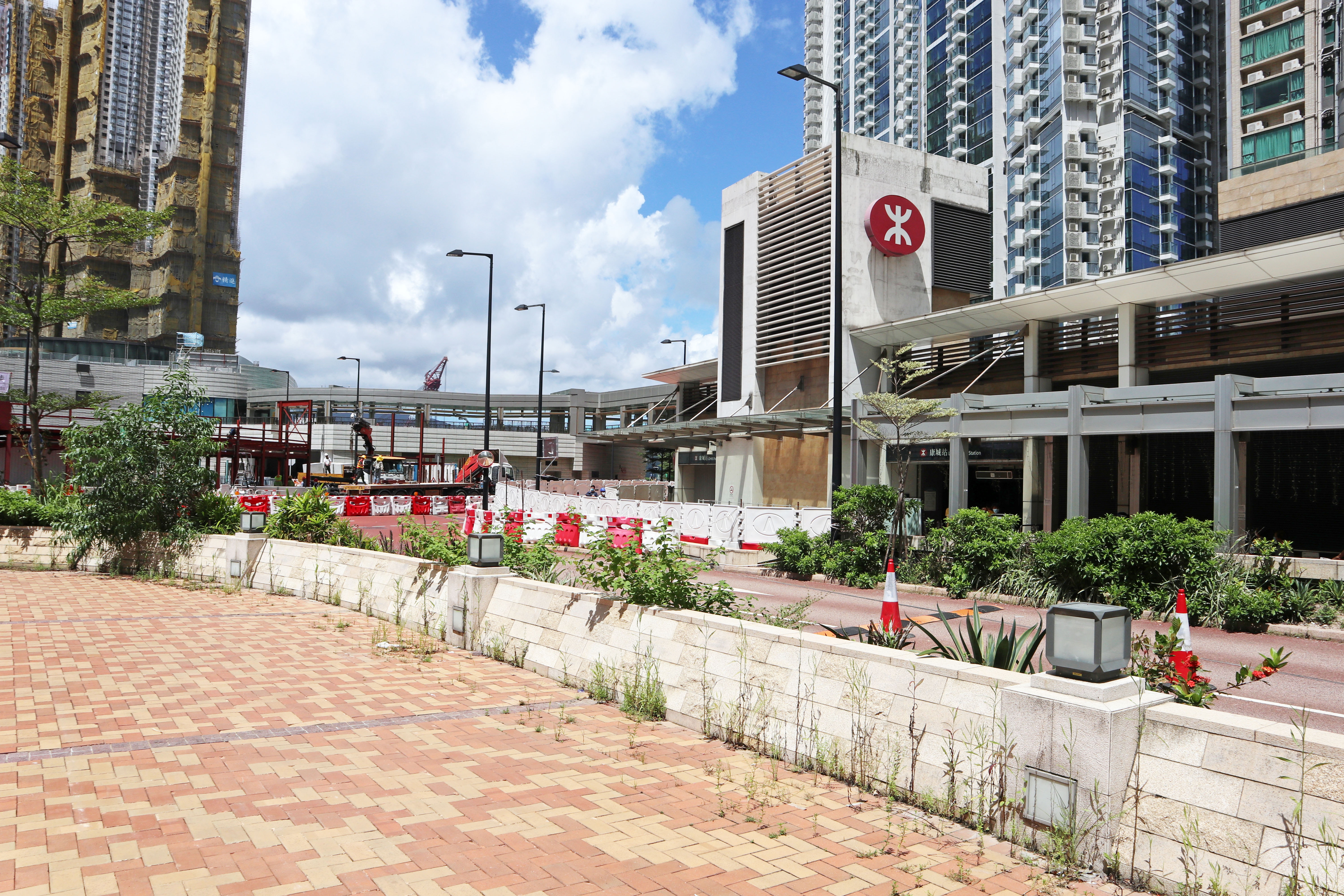 港鐵康城站外觀